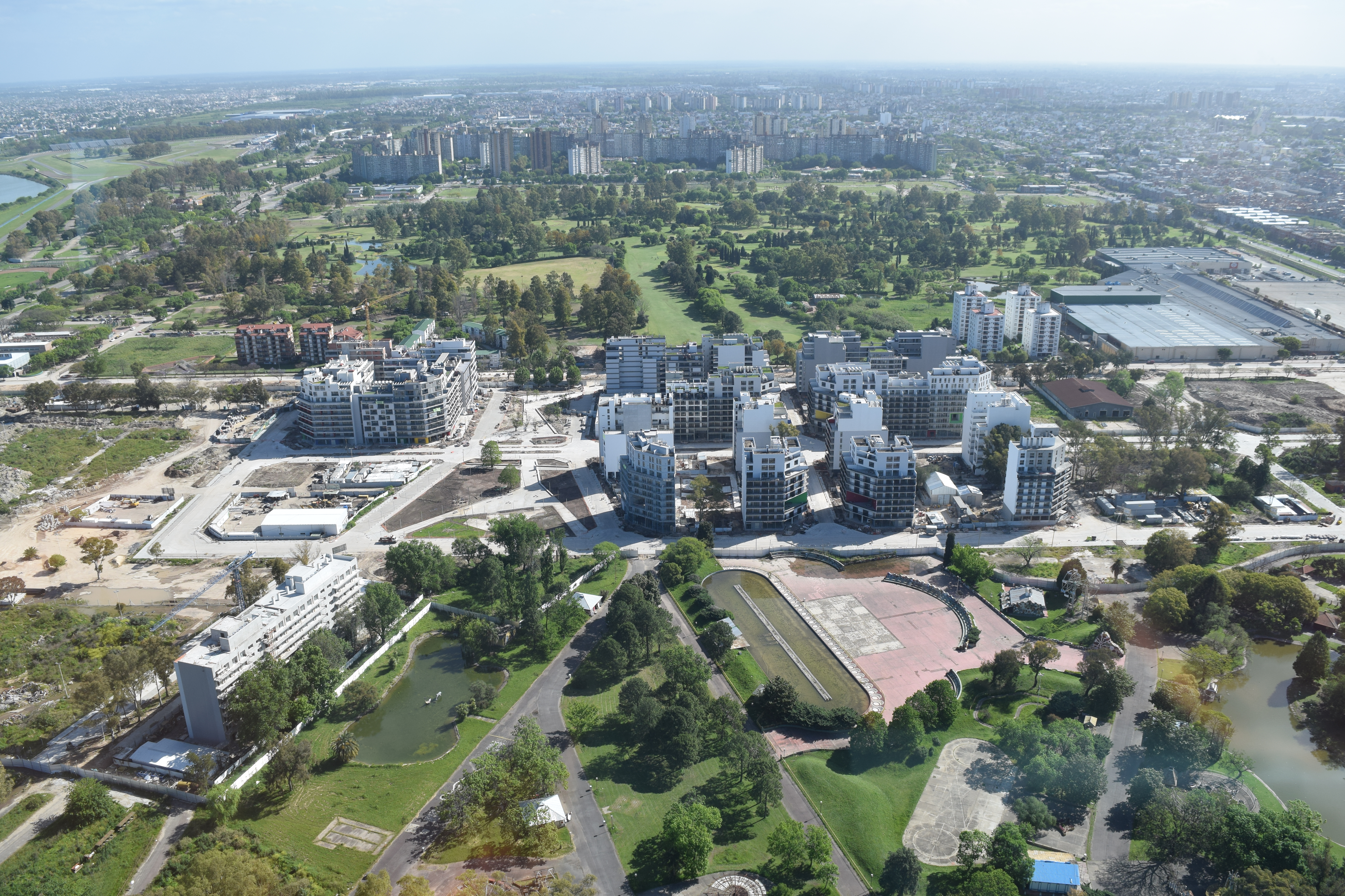 El Golf Club José Jurado y la Villa Olímpica de Buenos Aires desde la Torre Espacial (Interama).